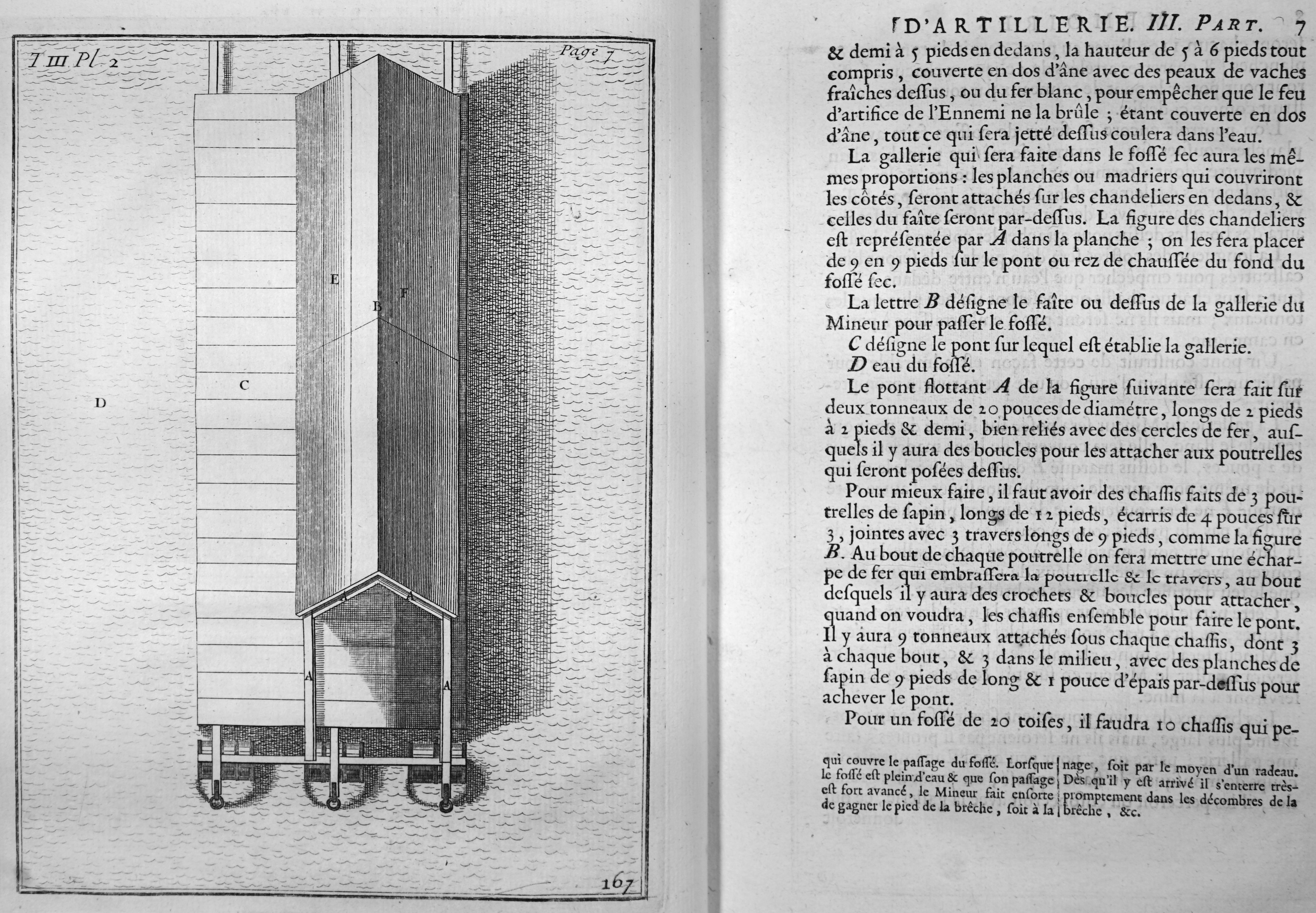 Mémoires d'artillerie, recueillis par M. Surirey de Saint Remy, tome III, exemplaire de la B.M. de Reims, troisième édition.